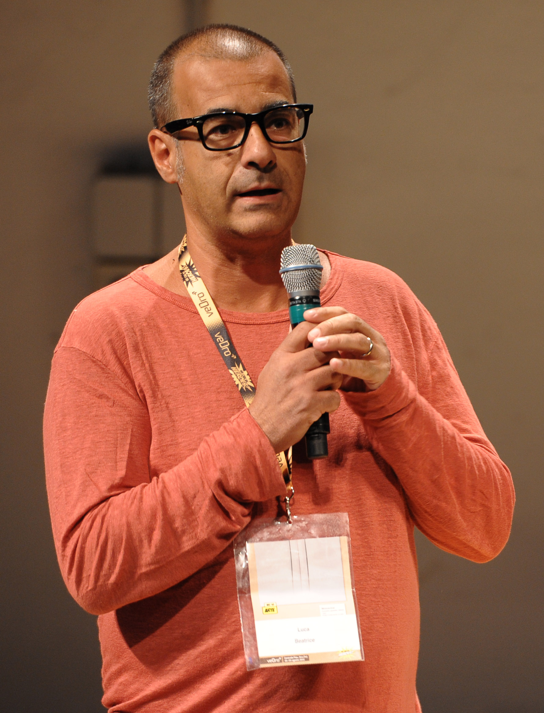 Luca Beatrice